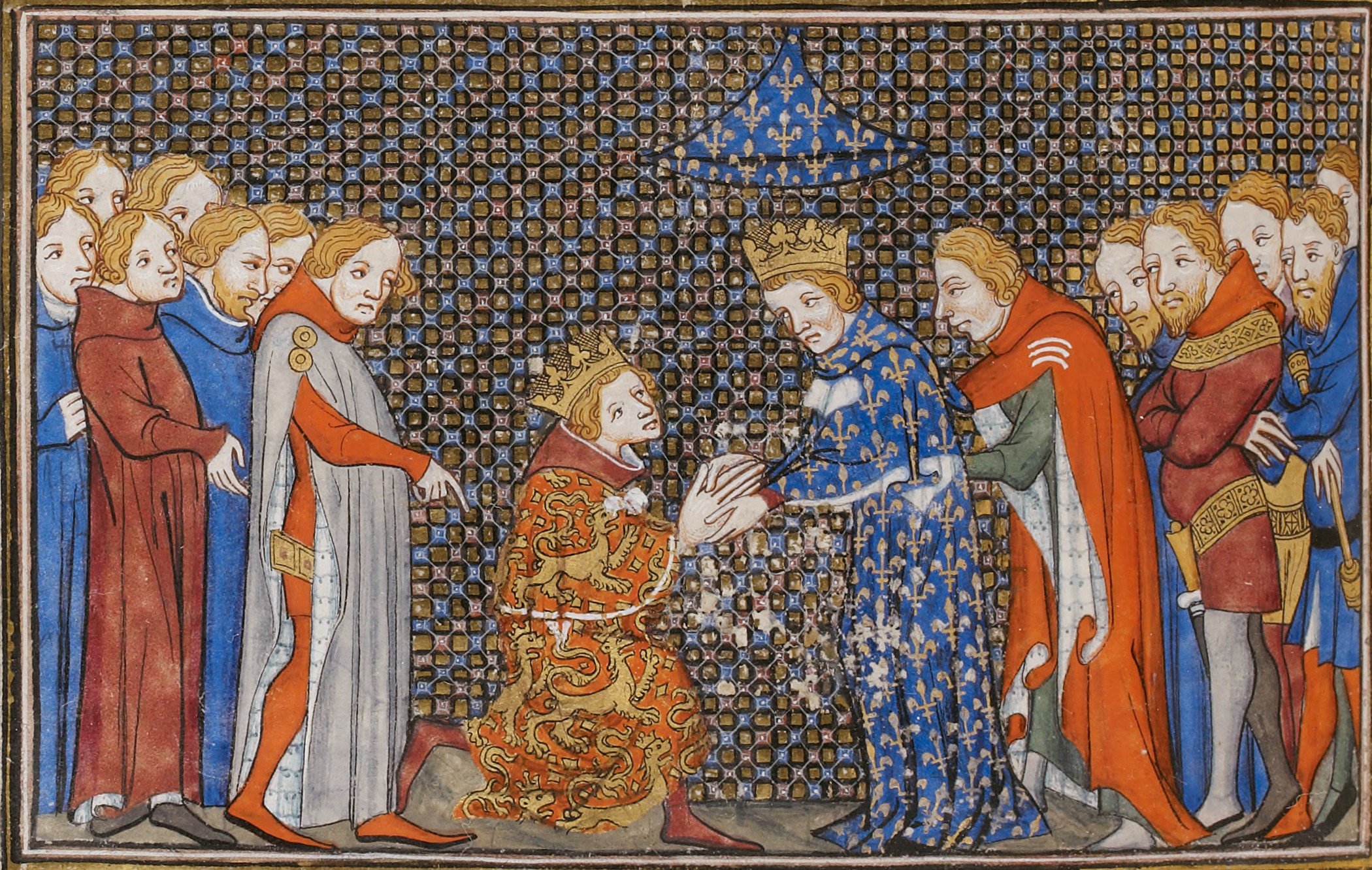 Hommage d'Édouard III d'Angleterre à Philippe VI de Valois le 6 juin 1329.